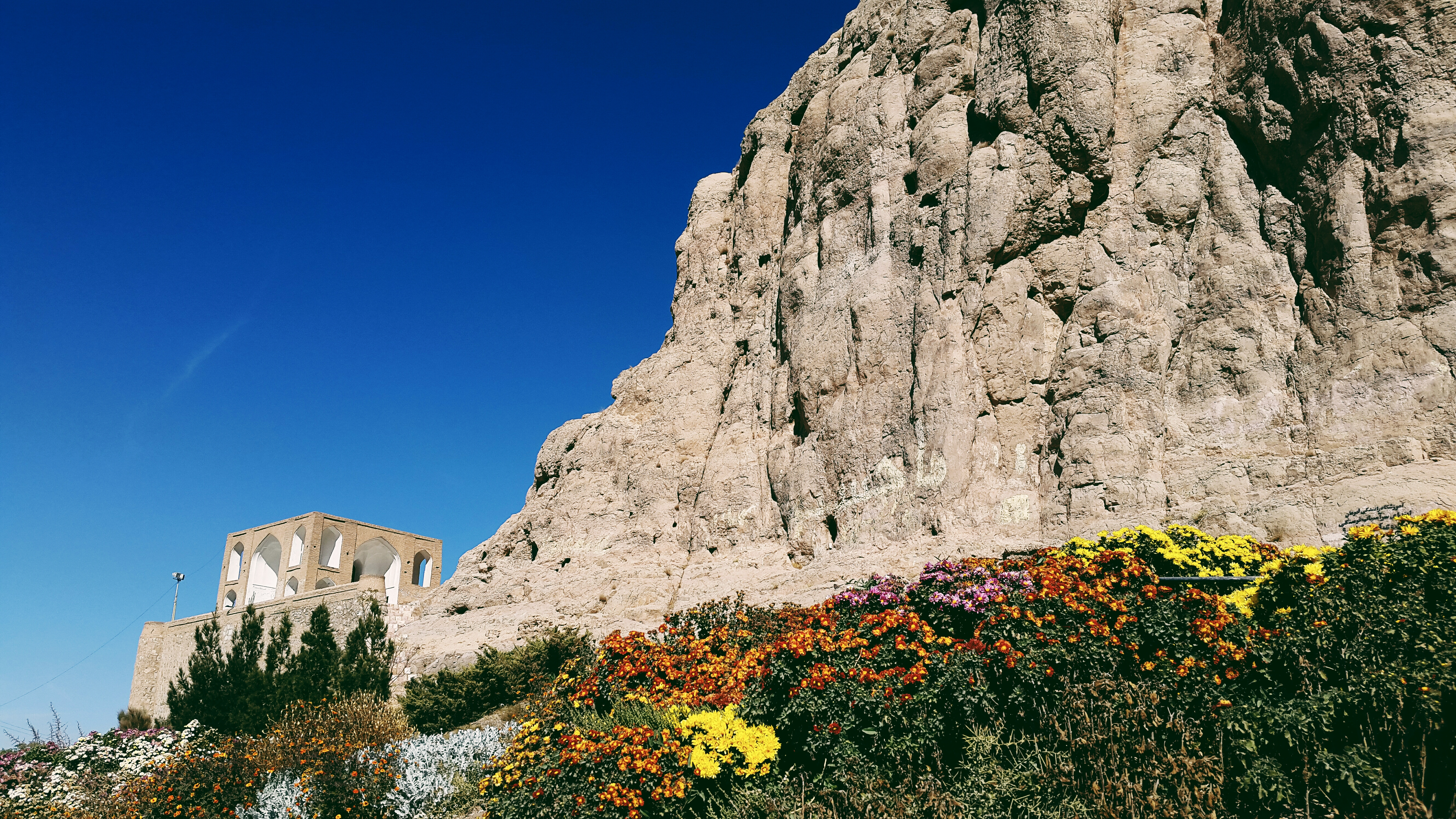 تخت درگاه قلی بیگ